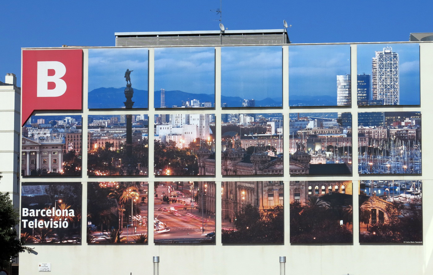 Barcelona Televisió, plaça Tísner (Poblenou, Barcelona)